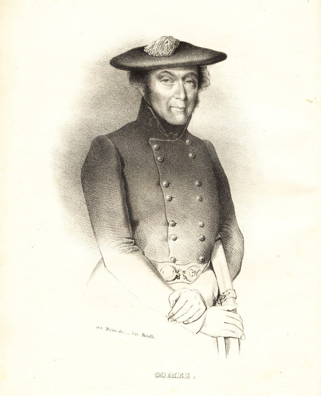 Miguel Gómez. Dibujo de Isidoro Magués. "Don Carlos e i suoi difensori". Firenze 1837